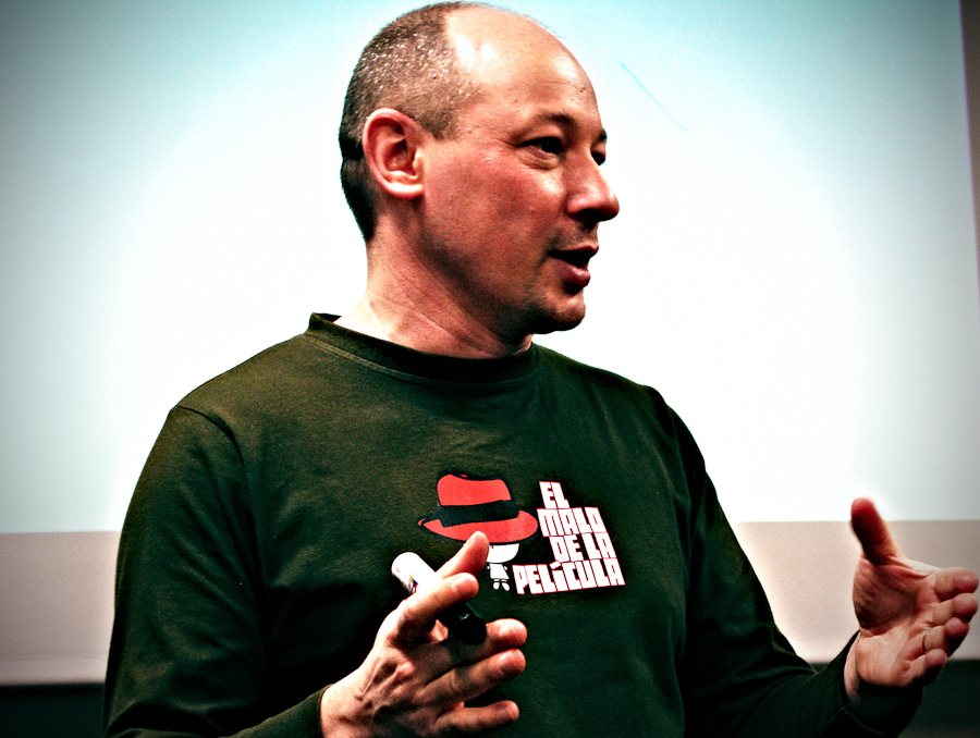 AlbertoOstini